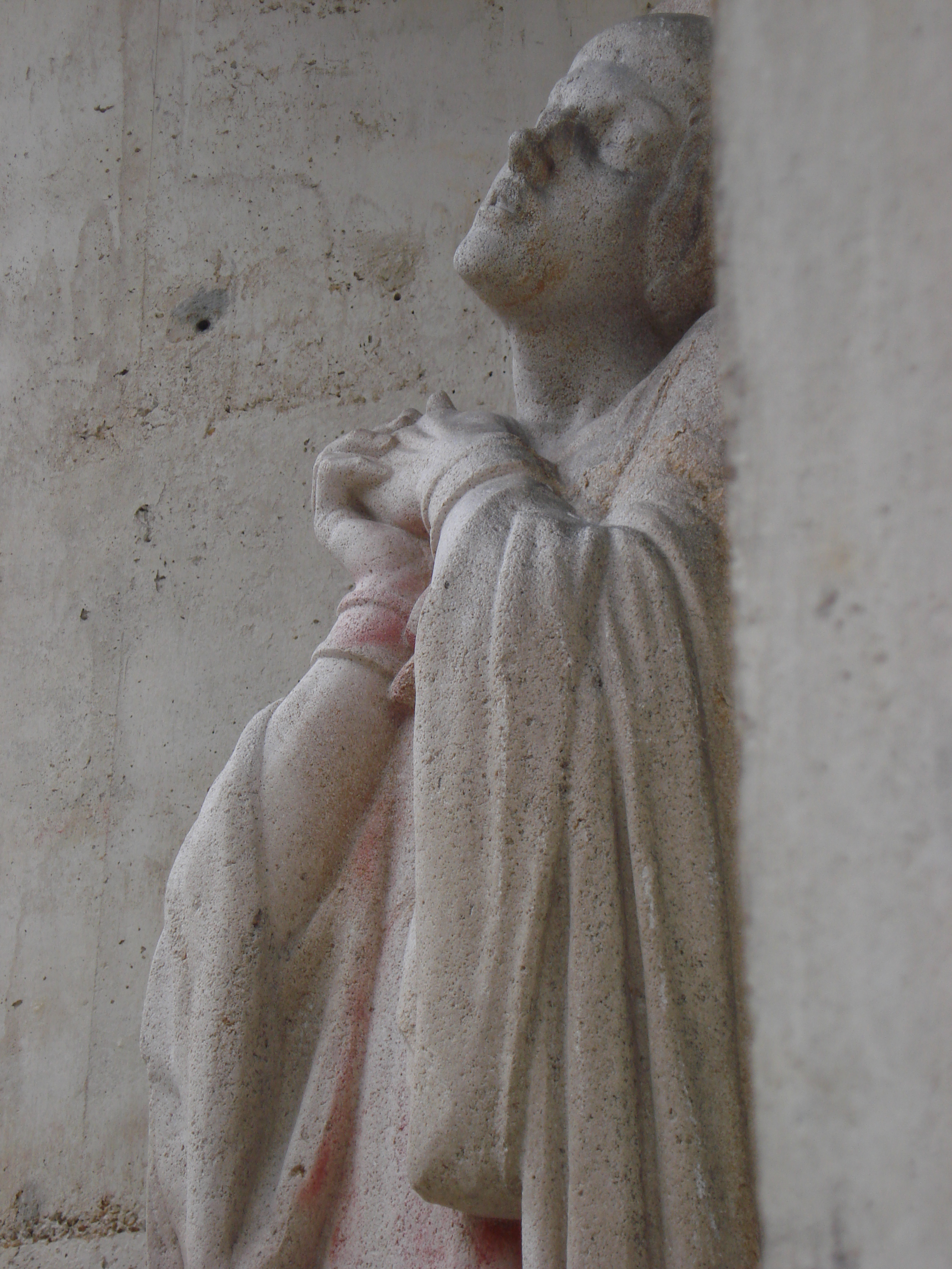 Église Sainte-Jeanne-d'Arc (Inscrit) .